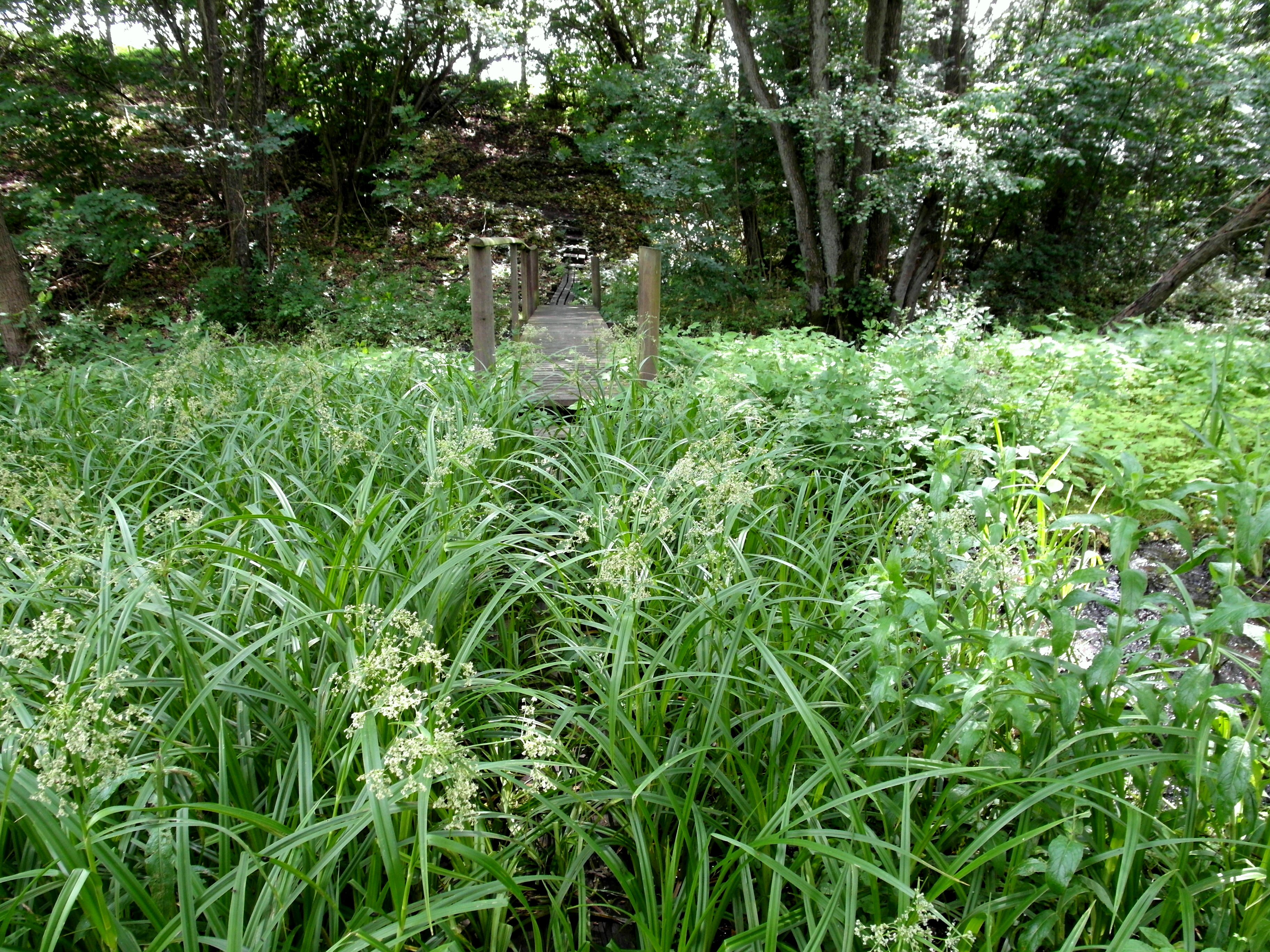 Övervuxen gångbro över Sularpsbäcken i Fågelsångsdalen.